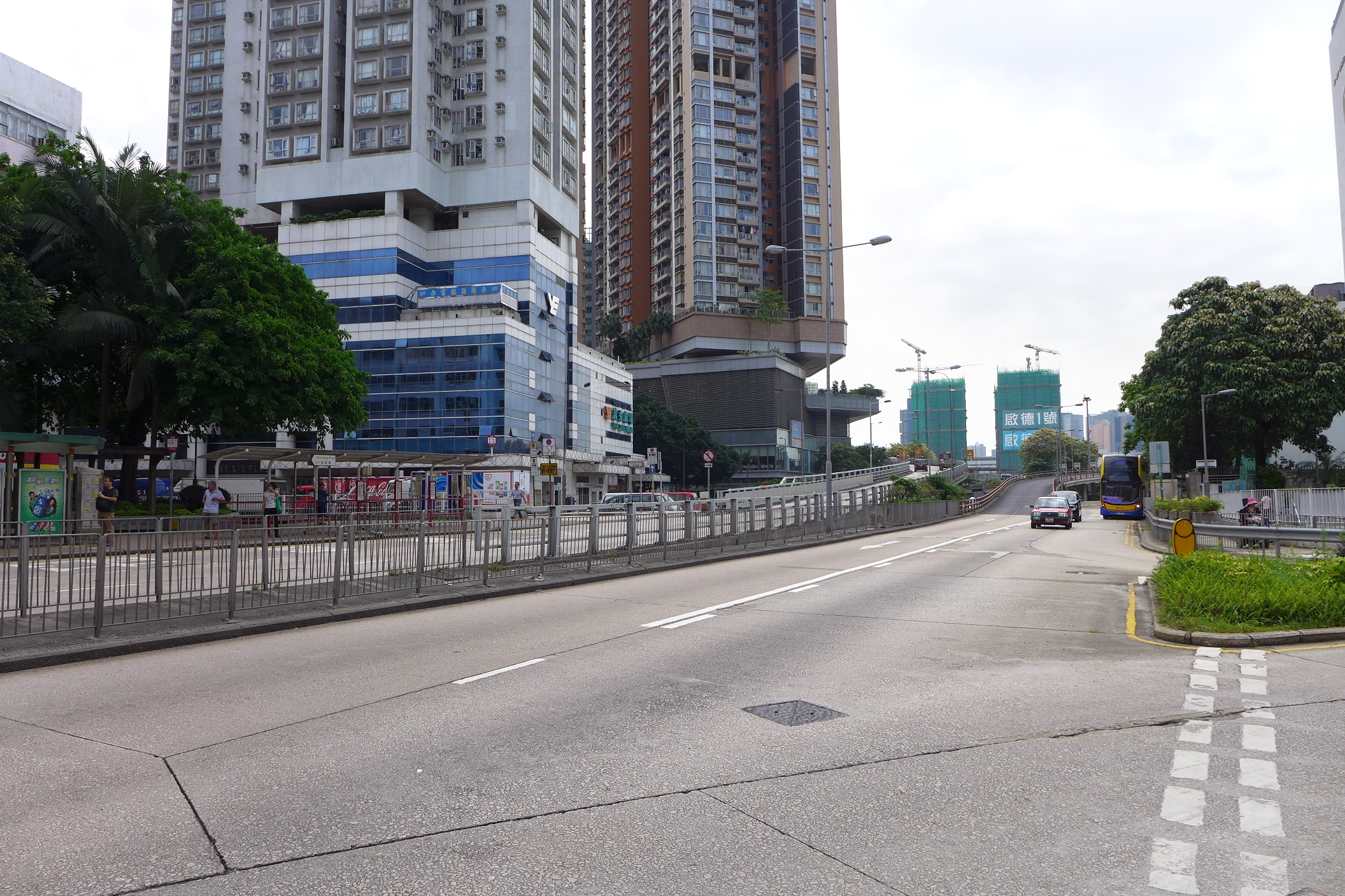 Choi Hung Road